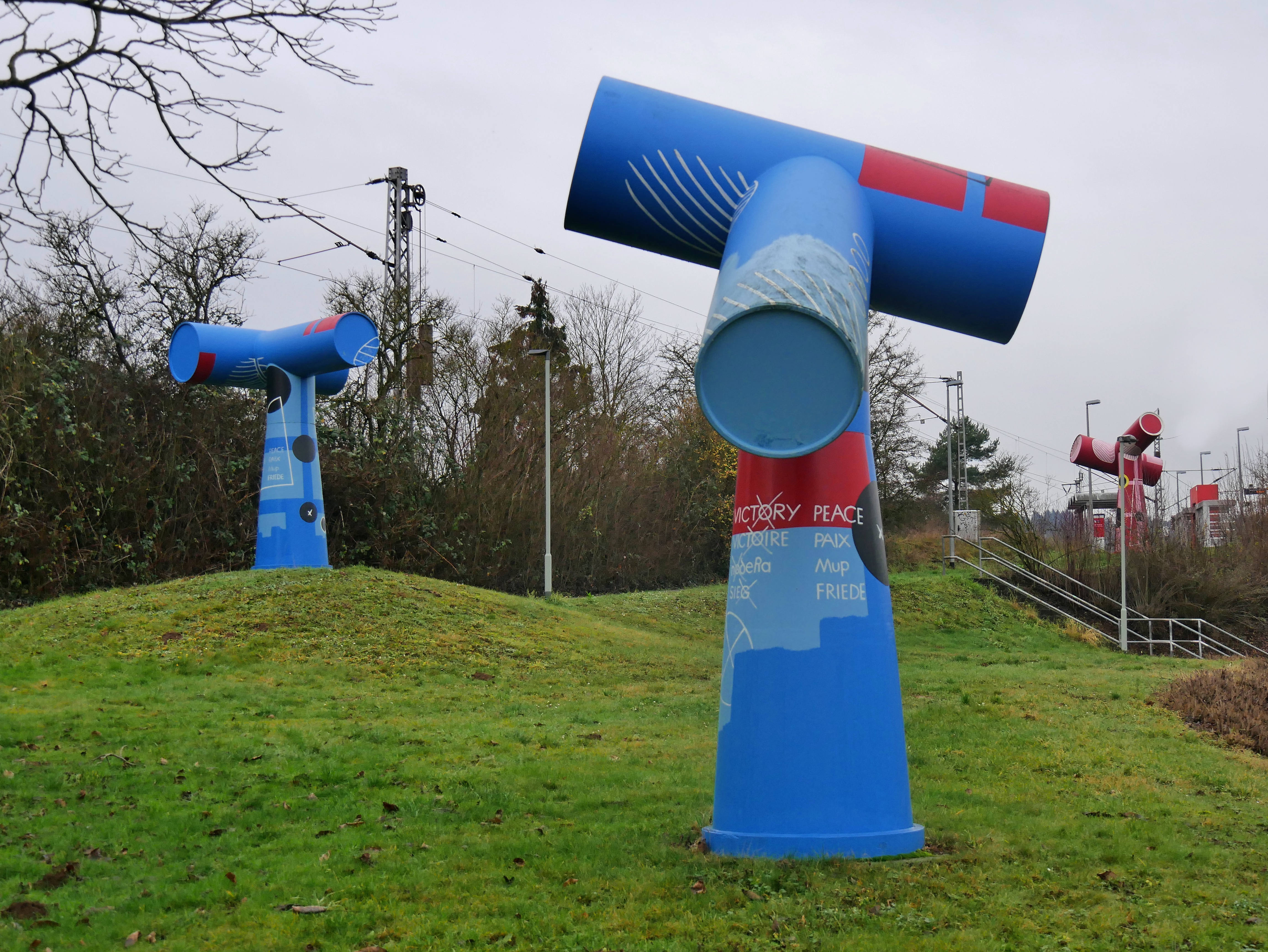 "Drei Entsorgungsmale" von Friedrich Gräsel in Konz beim Bahnhof Kreuz-Konz. Oben die Bahn von der Saarbrücke kommend links in Richtung Obermosel und rechts in Richtung Trier.